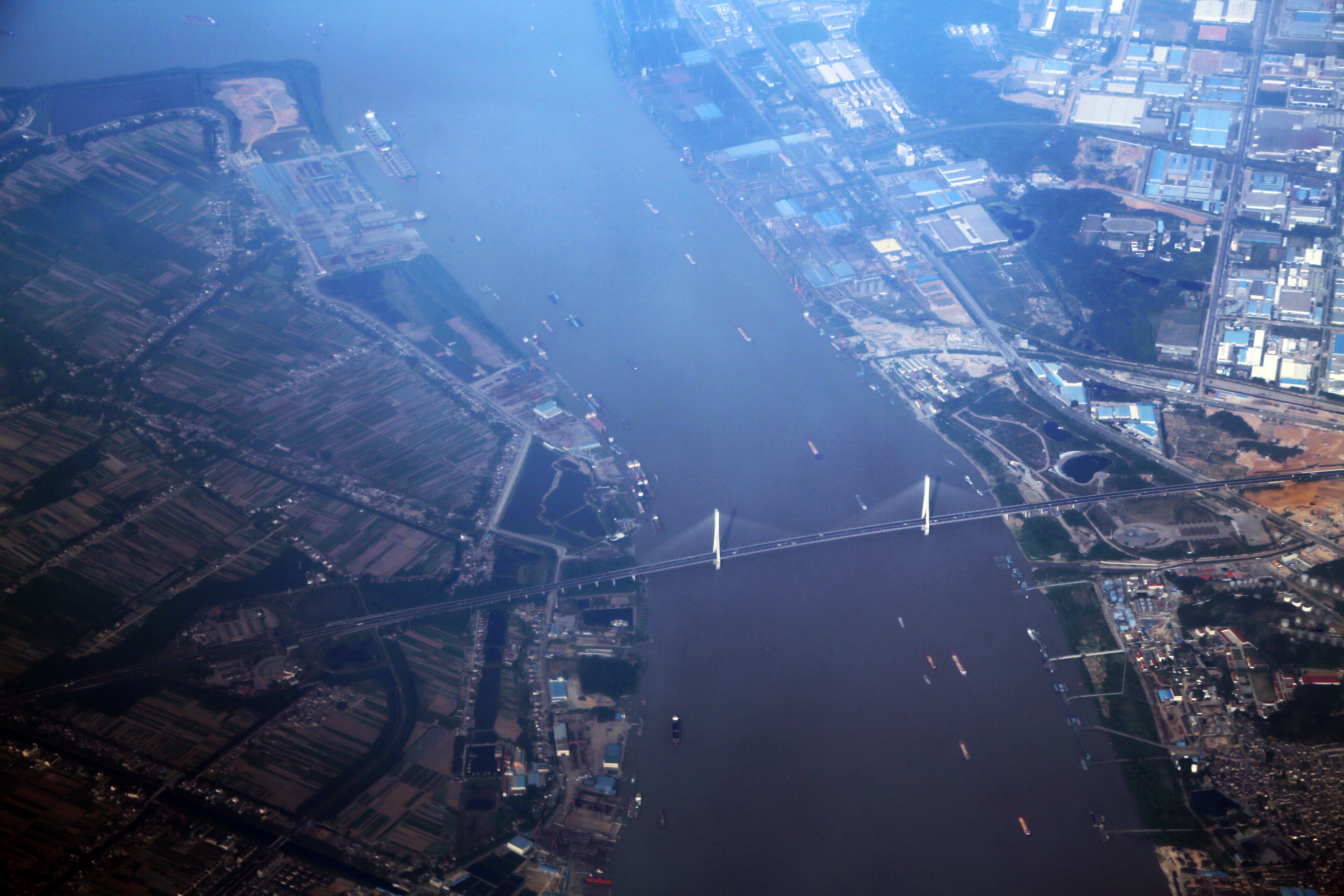 南京长江二桥